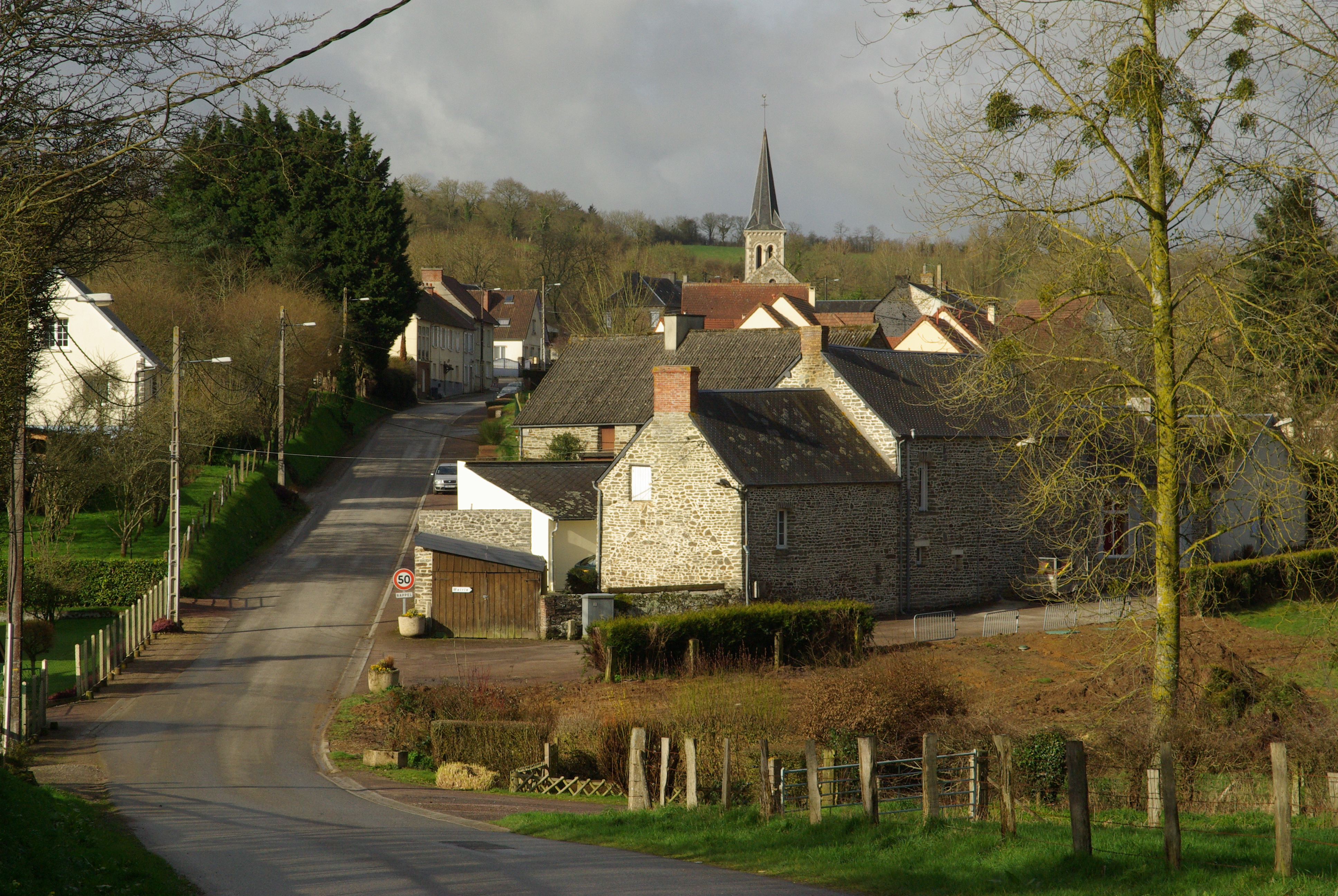 Village de Saint-Lambert.